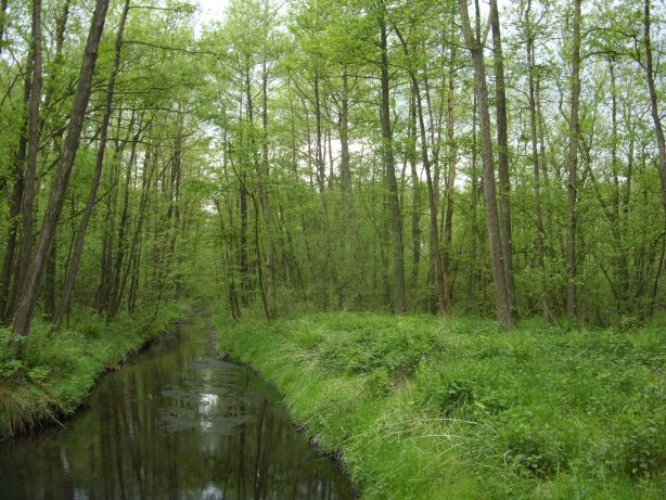 Naturschutzgebiet „Bäken der Endeler und Holzhauser Heide“ (Aue)